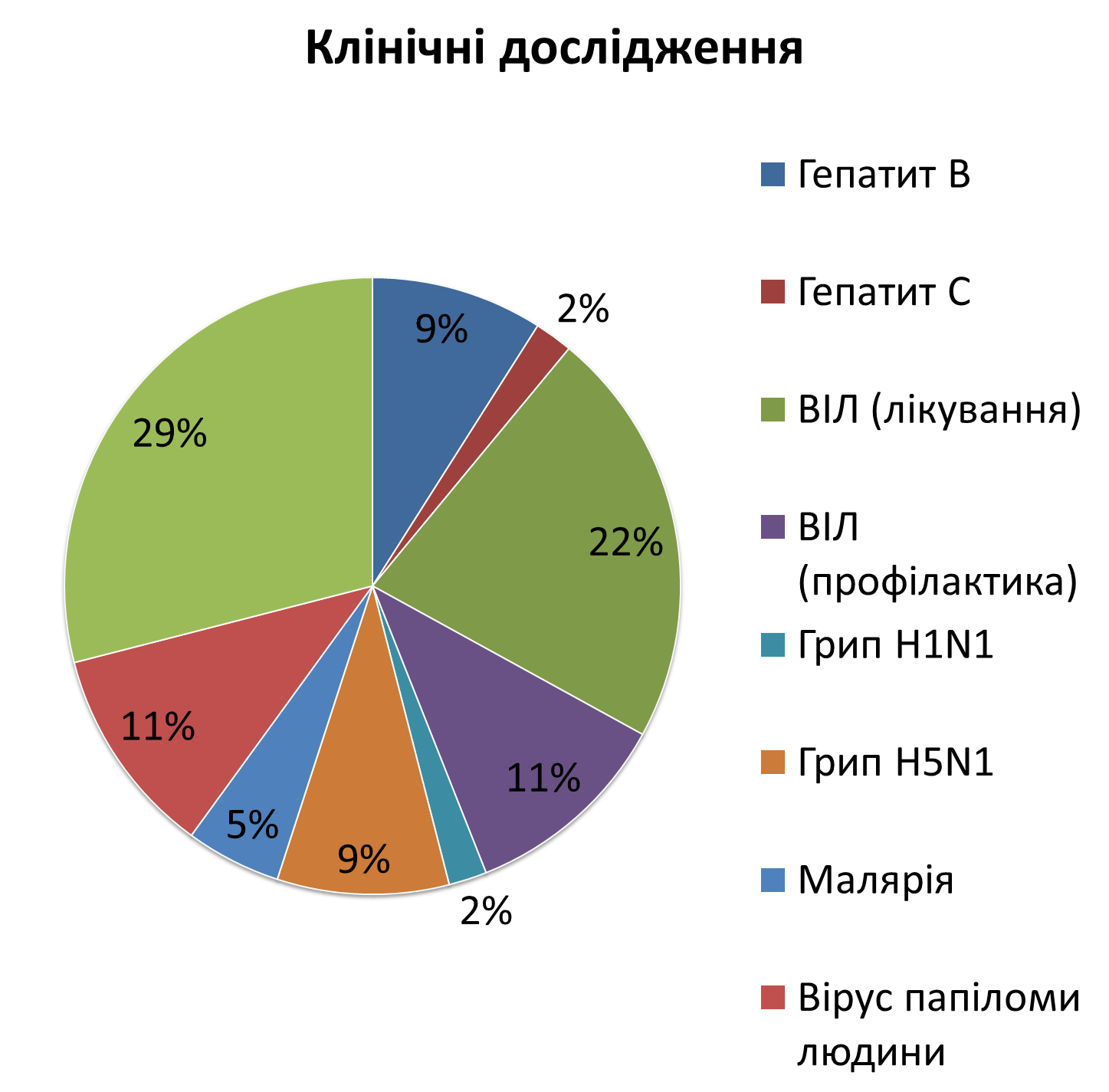 Розподіл клінічних досліджень ДНК-вакцин згідно мети. Загальна кількість випробувань станом на 2011 рік - 43. Дані отримані з database: A service of the U.S. National Institutes of Health.